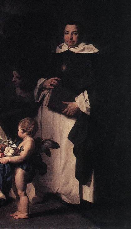 Raimund von Capua als Zeuge der mystischen Hochzeit der hl. Katharina von Siena; Detail des Gemäldes von Pierre Subleyras